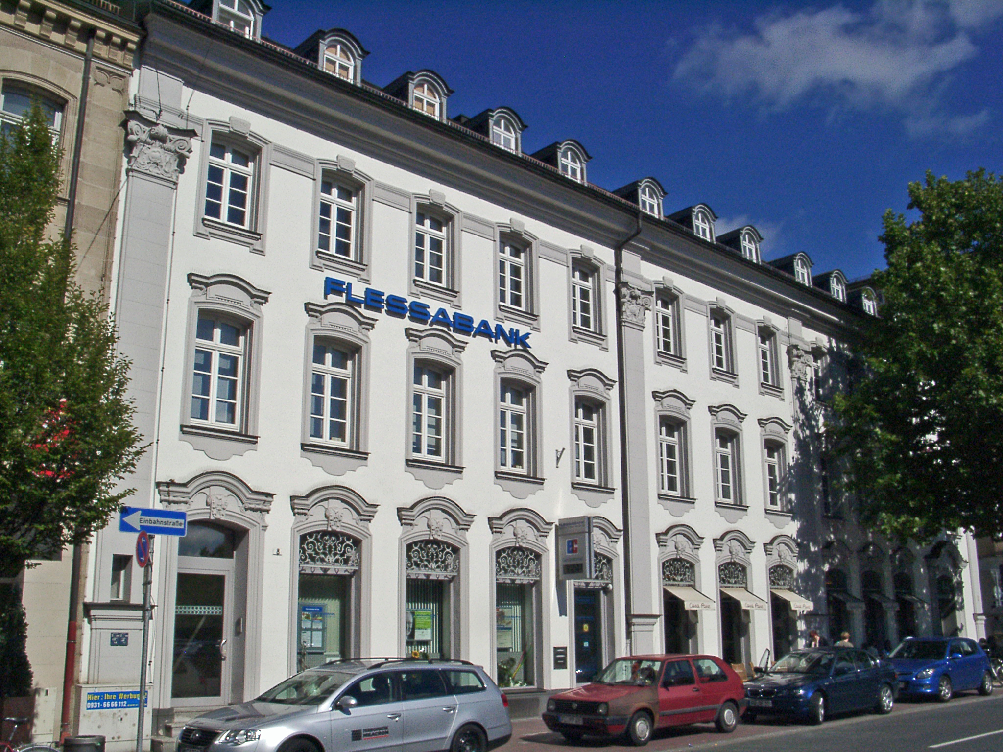 Fürth, Friedrichstraße 8.